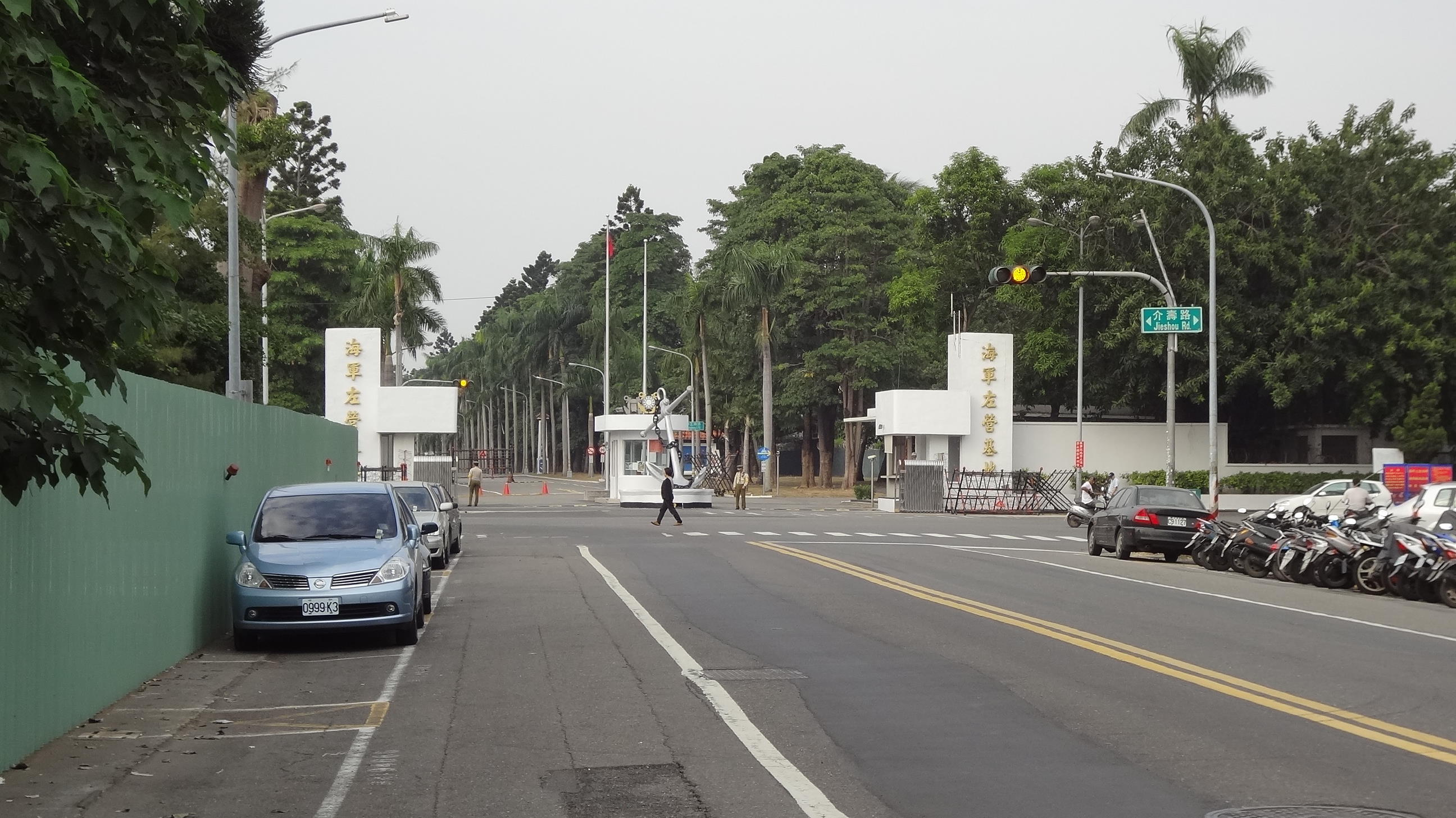 中華民國海軍左營基地中正哨，位於高雄市左營區中正路、介壽路口，衛哨勤務由憲兵執行。